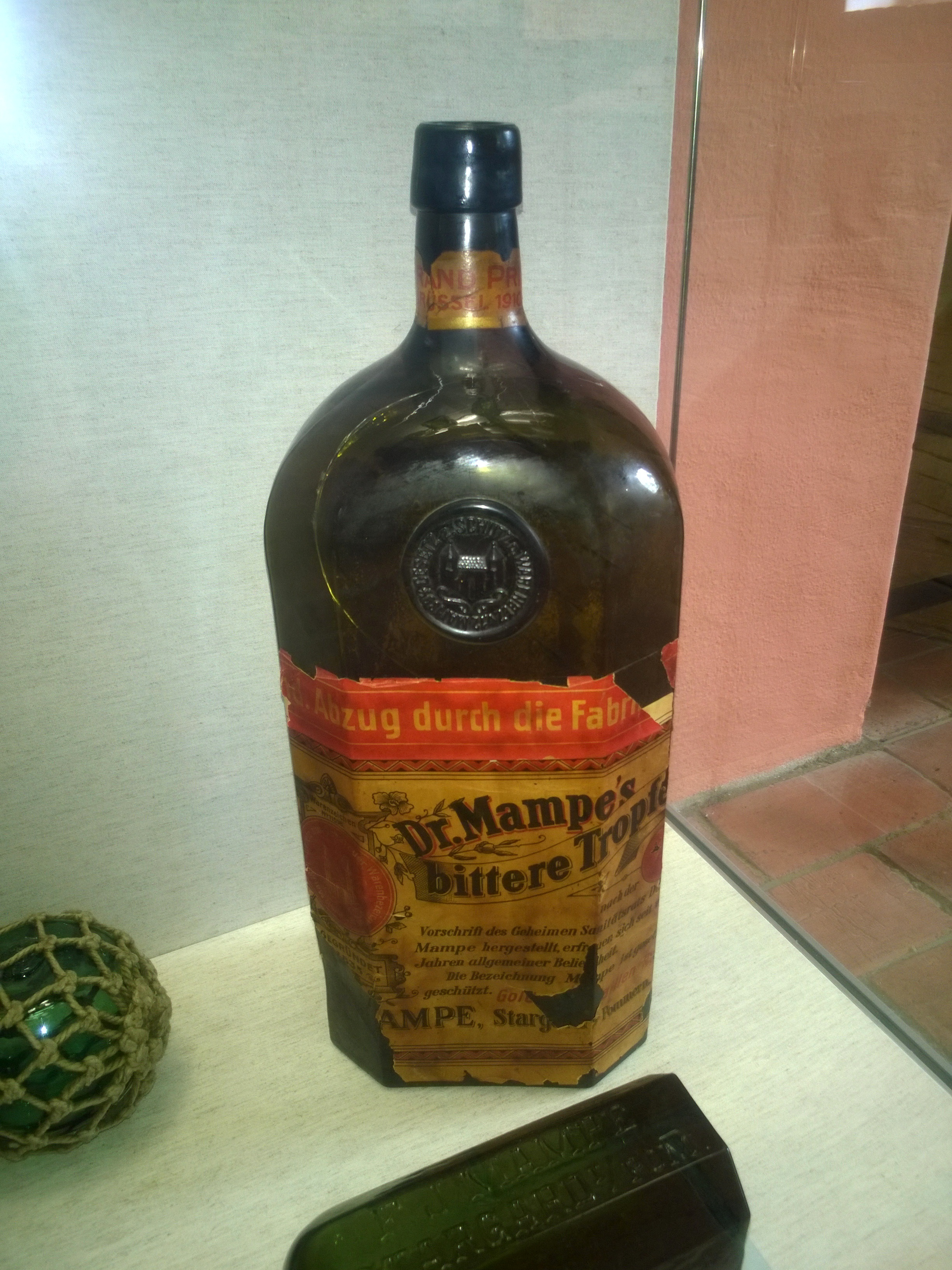 Dr. Mampe's bittere Tropen; Mampe, Stargard in Pommern; Flasche (nach 1910) im Museum des Dreißigjährigen Krieges in Wittstock/Dosse